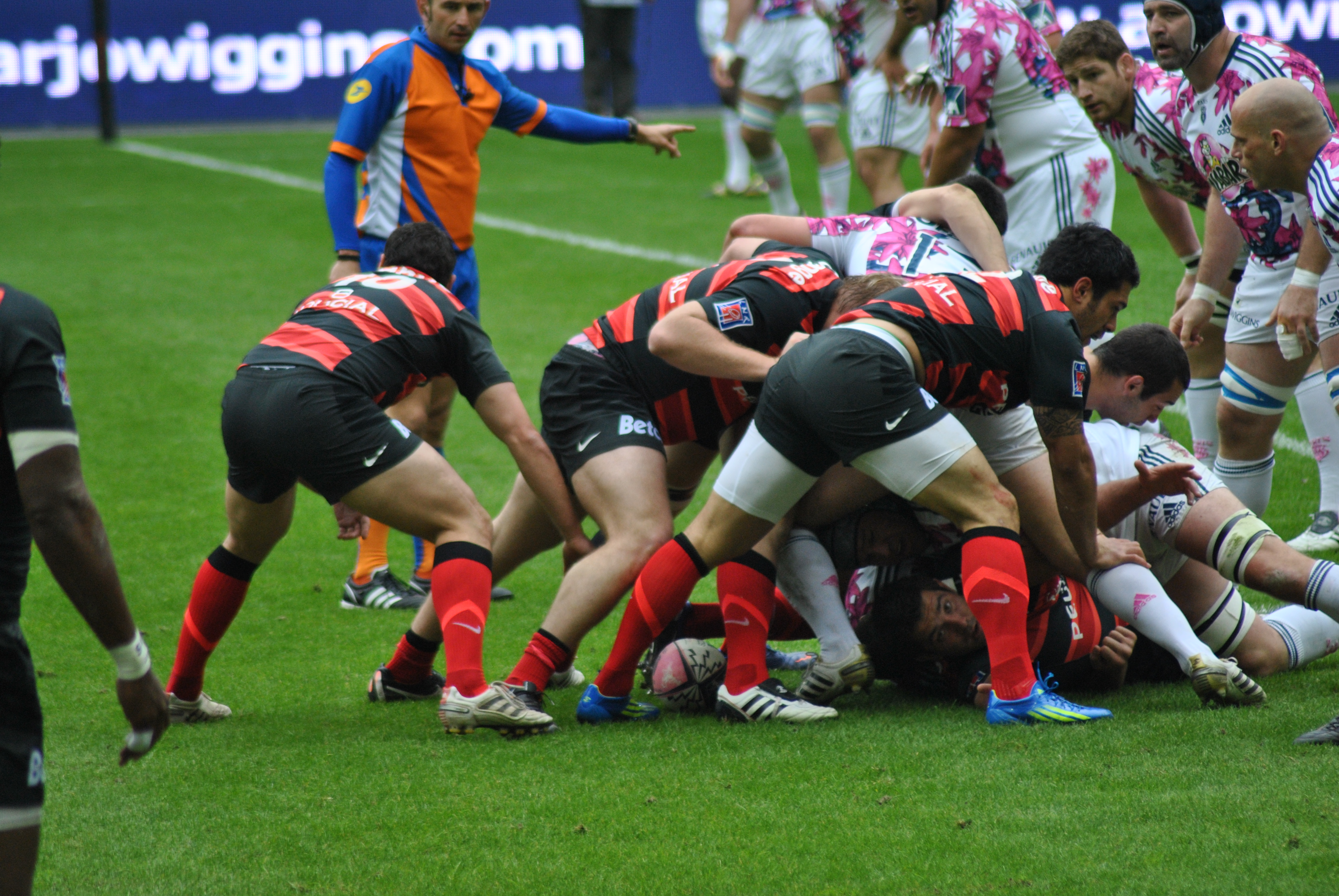 Top14 Stade français contre Stade toulousain le 30 mars 2012